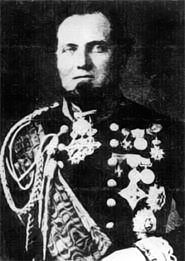 ammiraglio della Regia Marina